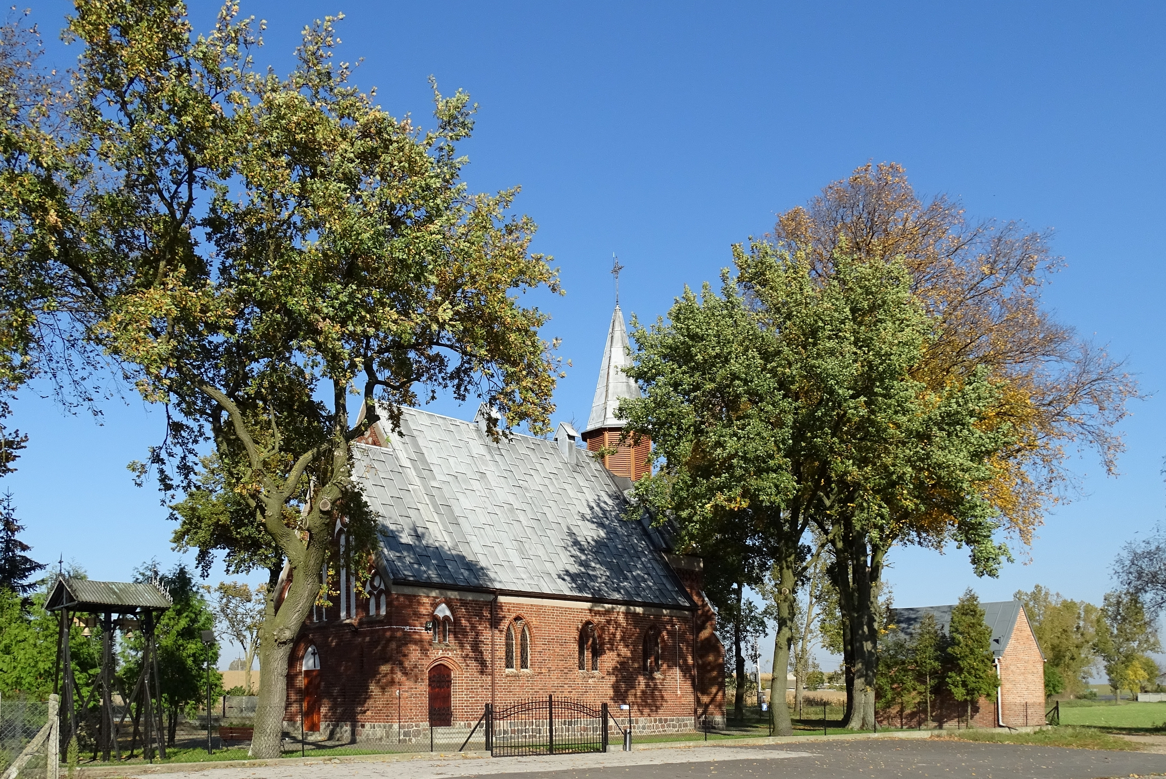 Dźwierzchno, Gmina Złotniki Kujawskie, Poland. Church of Saint Catherine. Early XX century.